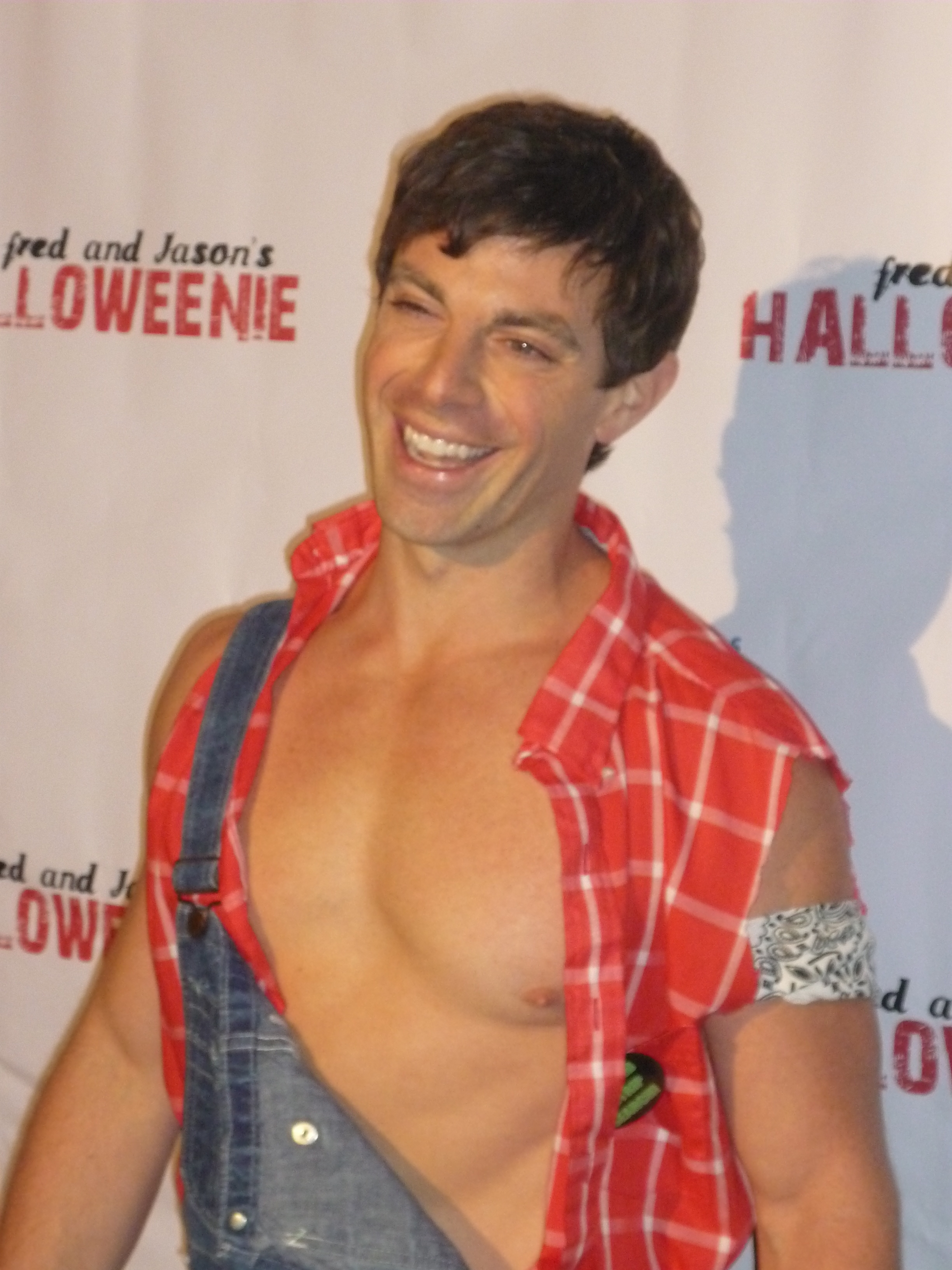 David Morretti